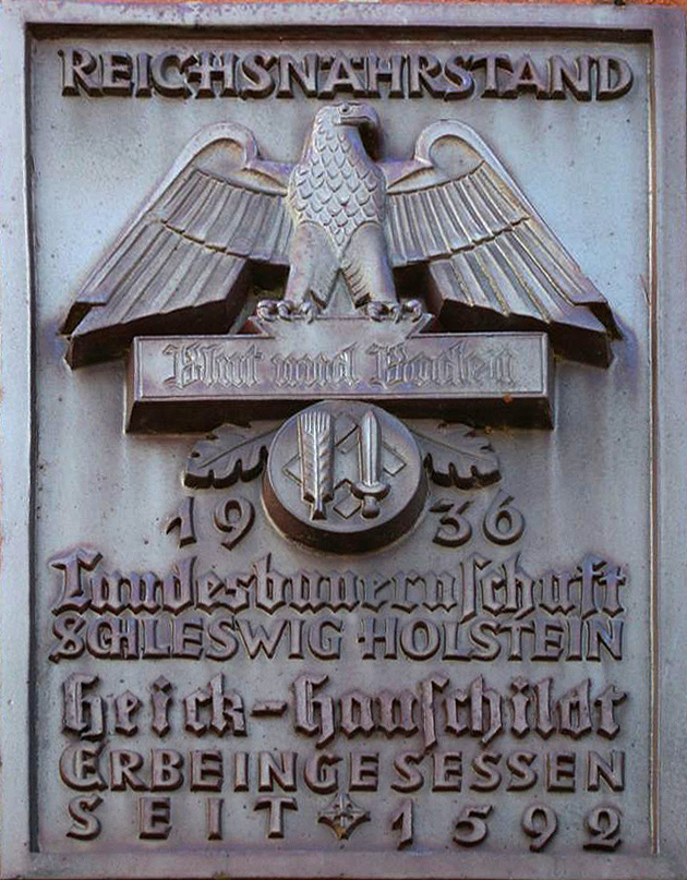 Vom Reichsnährstand 1936 gekennzeichneter Erbhof.